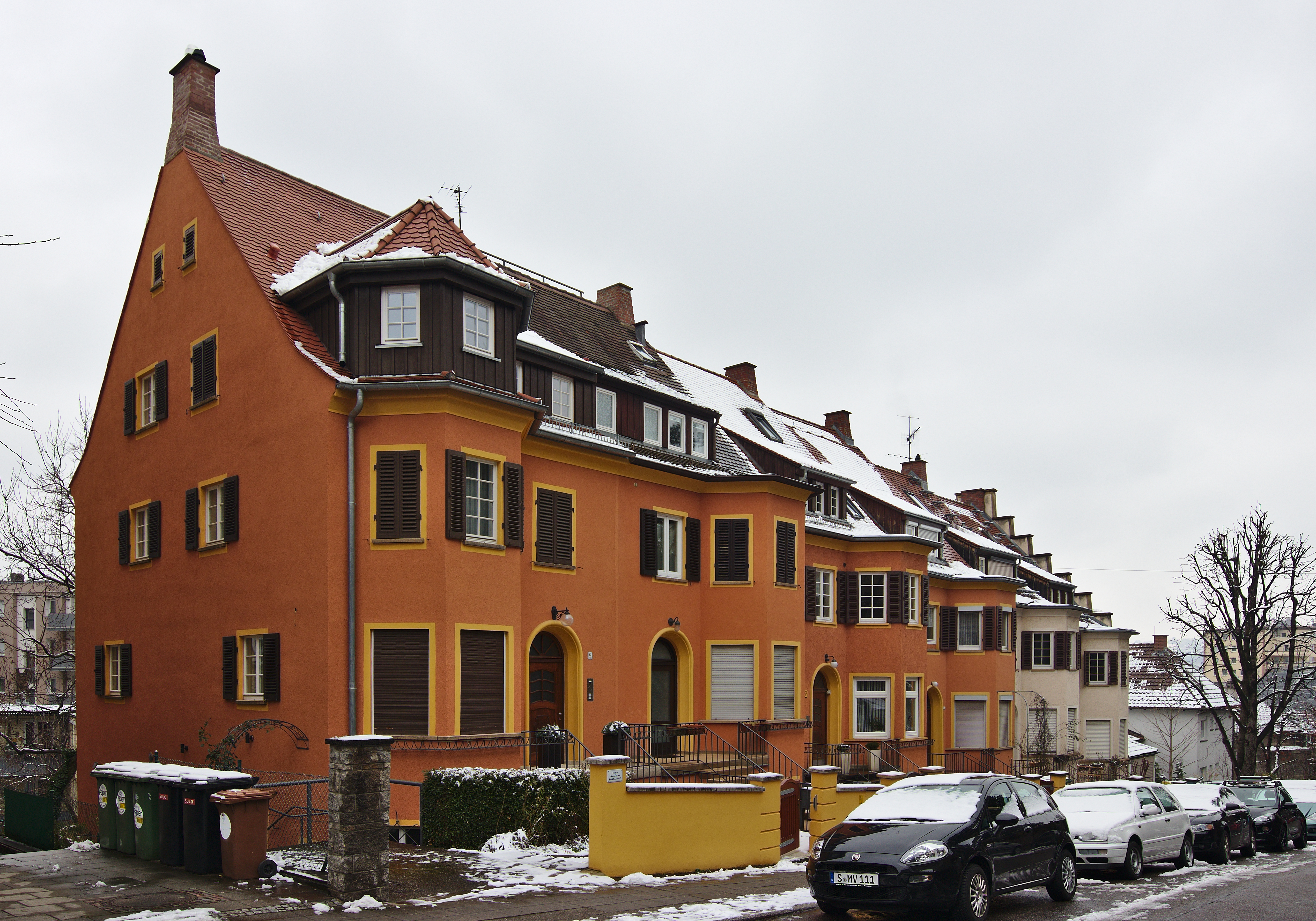 Reihenmietshäuser „Villenkolonie Unterer Sonnenberg“, Sonnenbergstraße 6A-6F in Stuttgart. Erbaut 1925 von Wilhelm Ritter von Graf im Stil des Heimatstils bzw. des Expressionismus. Geschützt nach § 2 DSchG